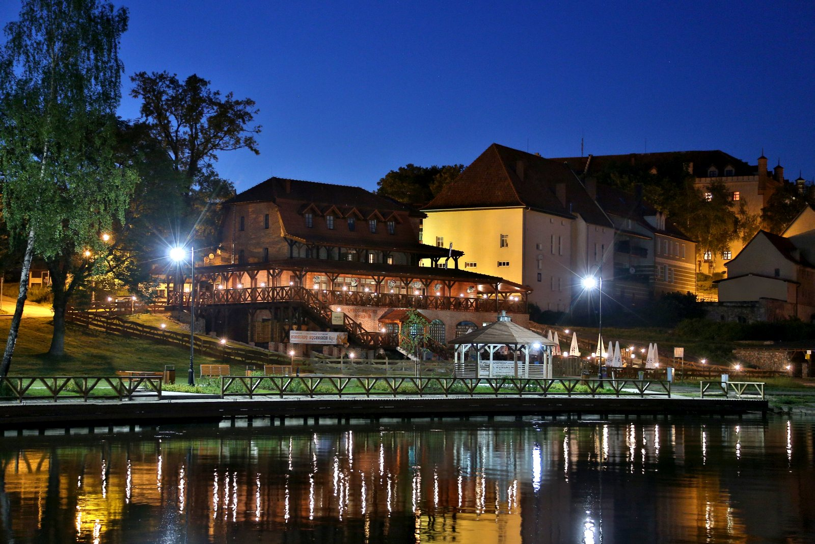 Zabudowa centrum Rynu od strony ekomariny (od strony Jeziora Ryńskiego), Na pierwszym planie Gościniec Ryński Młyn, dalej Ryńskie Centrum Kultury oraz Willa pod Zamkiem, w tle Hotel ZAMEK RYN****